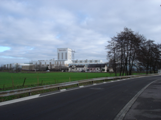 Laminoir à froid et ligne de galvalisation de Ste Agathe.